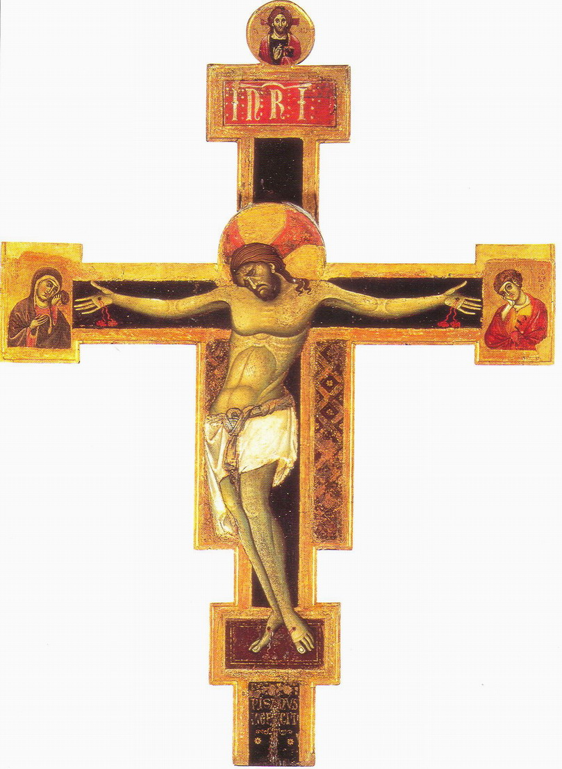 Giunta pisano, crocifisso di san ranieri